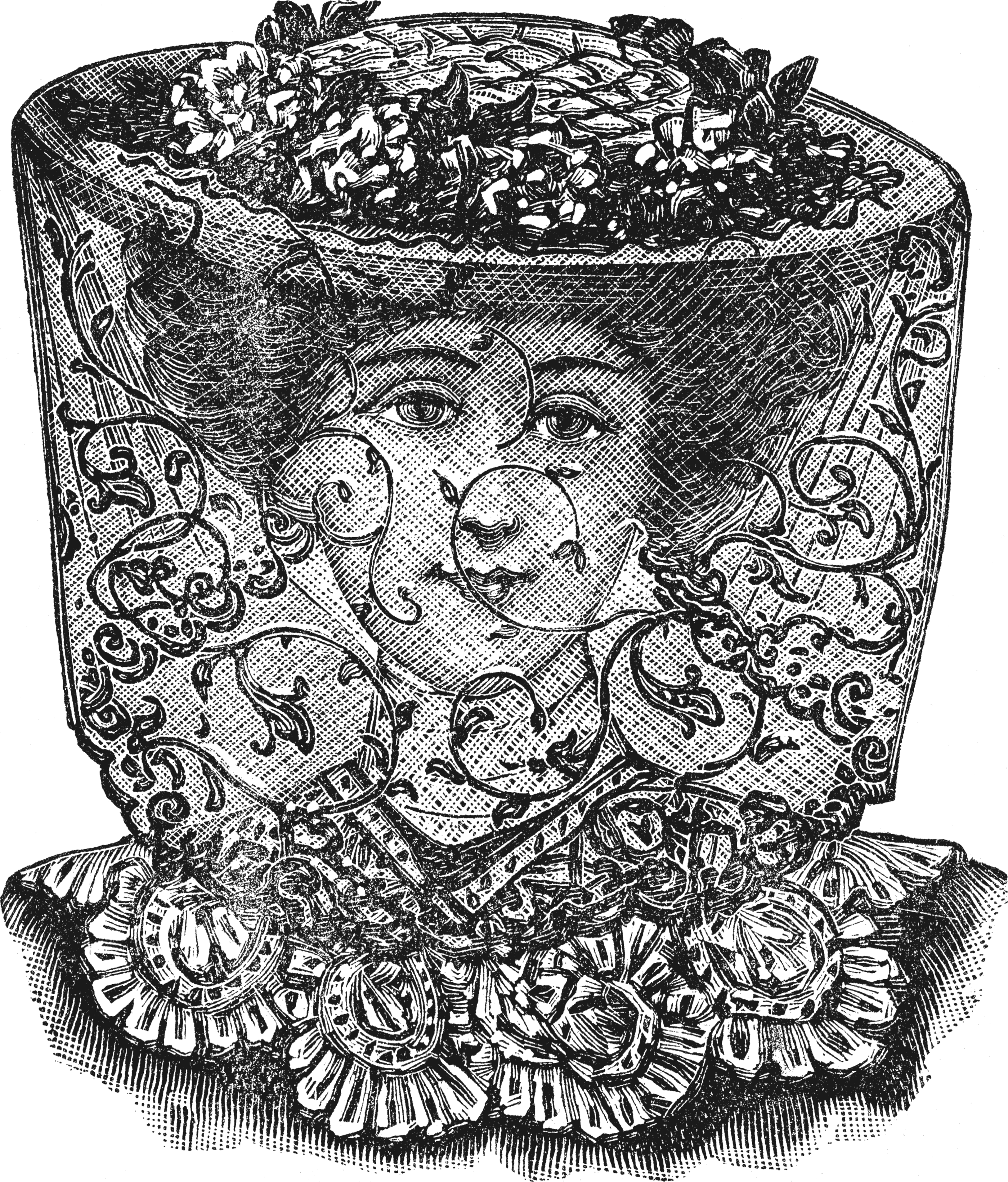 VOILETTE tulle Chantilly brodé en noir. Longueur 1m30, largeur 0m39. La voilette 2.90